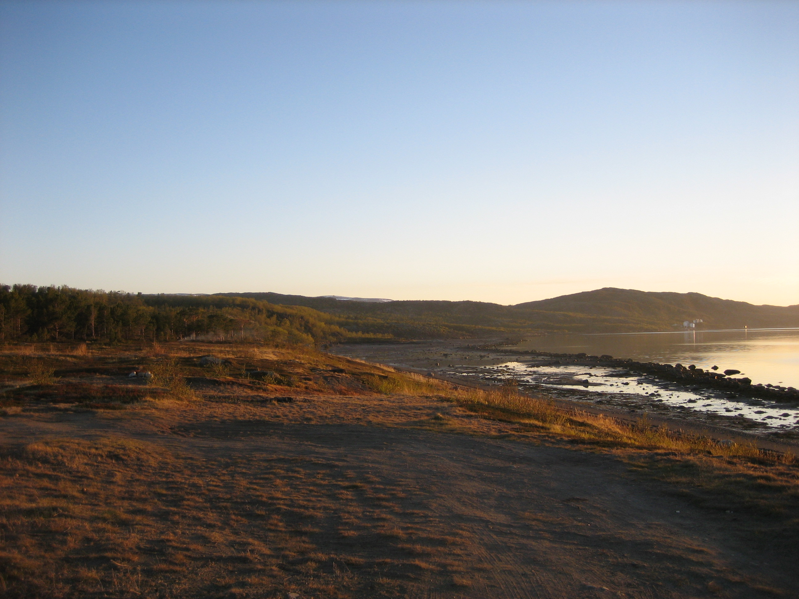 tatt nede i fjæra, også kjent som Furuflaten, kl.23.30 en deilig sommerkveld